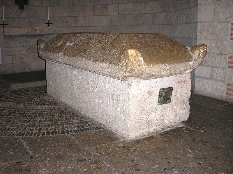 Ehemalige Benediktinerstiftskirche St. Ulrich und Afra (Augsburg, Bayerisch-Schwaben). Spätantiker Sarkophag der hl. Afra in der modernen Unterkirche. Eigene Aufnahme, März 2007 / Former Benedictine monastery church St. Ulrich and Afra (Augsburg, Bavaria, Germany). Late antiquity tomb of St. Afra (Modern crypt). Own photo, March 2007